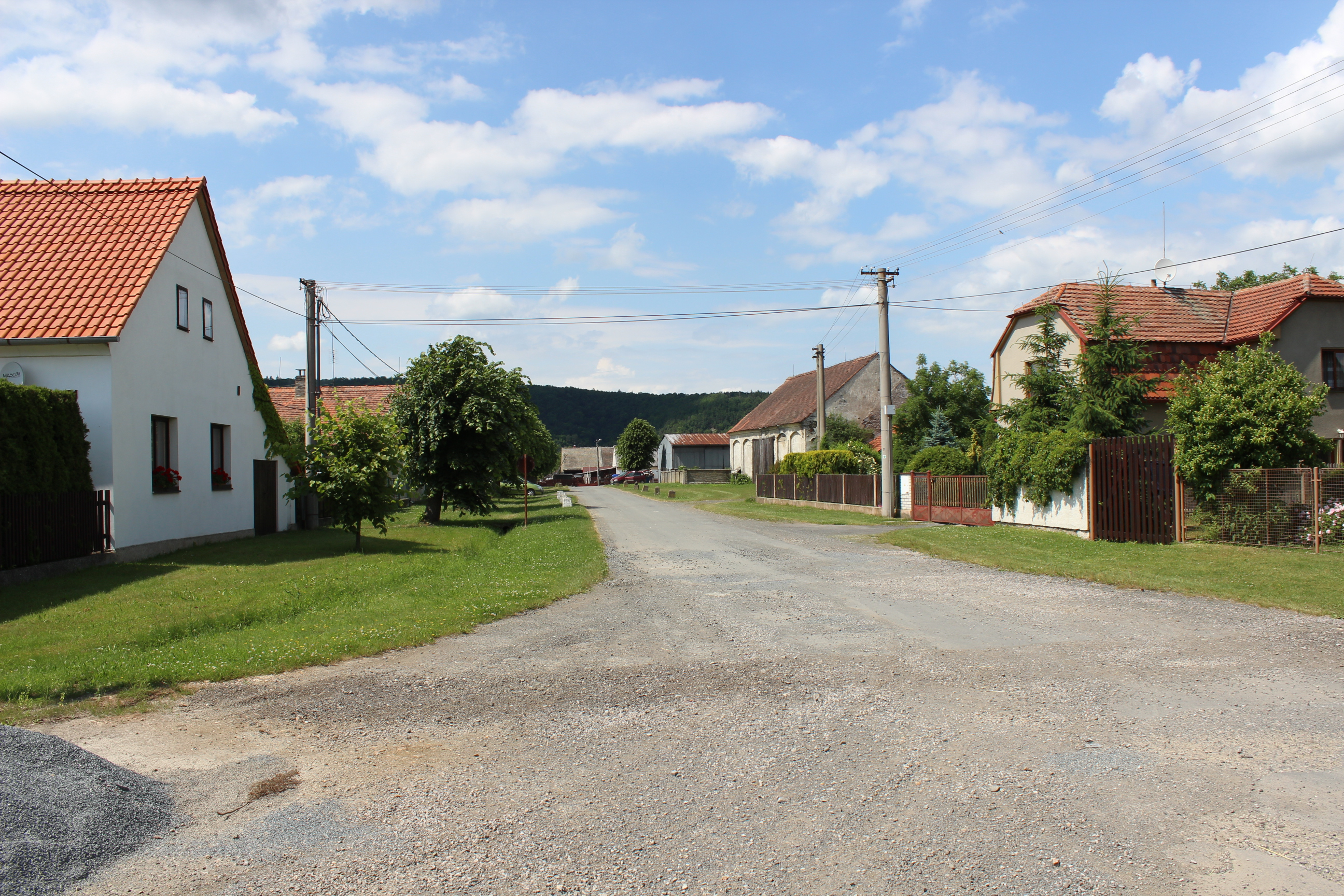 Zástavba v Újezdu nad Zbečnem.